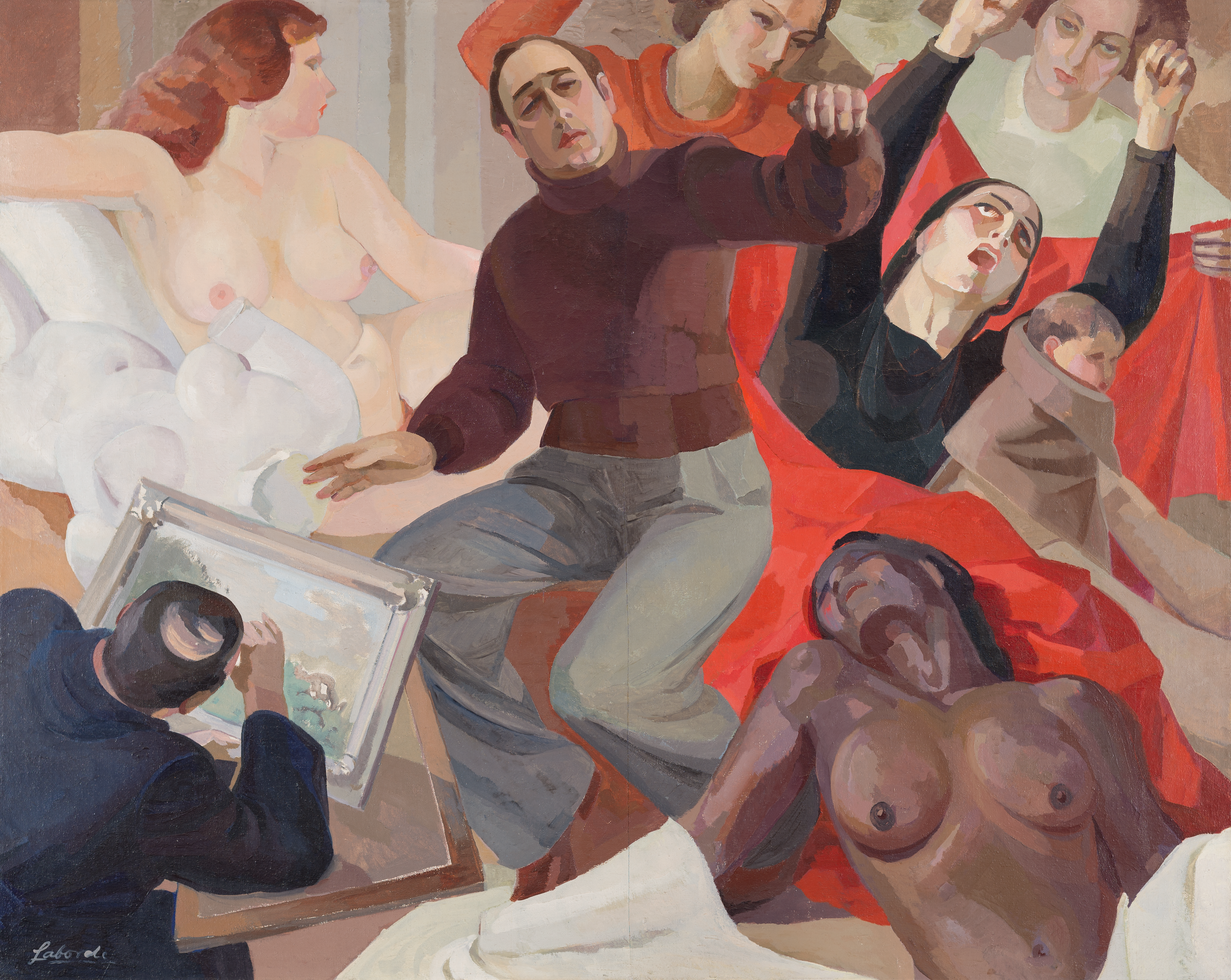 Obra "Autorretrato" del pintor uruguayo Guillermo Laborde. Óleo sobre tela de 200 cm. de alto x 250 cm. de ancho. Fotografía de la obra tomada por Eduardo Baldizan.